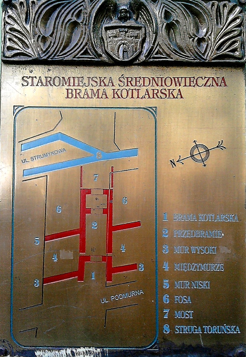 Tablica z lokalizacją średniowiecznej bramy Starego Miasta Toruń, XIII/XIV - 1834 r.